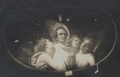 Aoteosi di Bellini